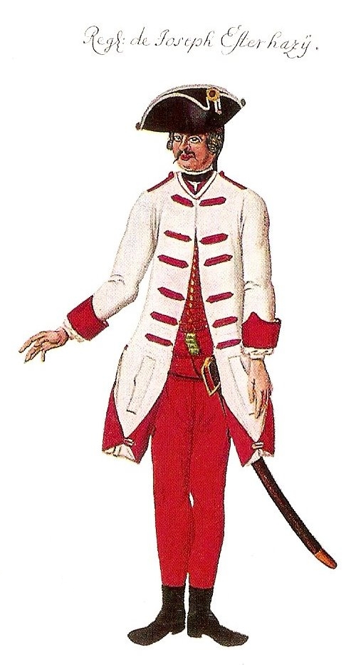 Kaiserliches Infanterieregiment Joseph Esterhazy 1762 (1769: No. 33)